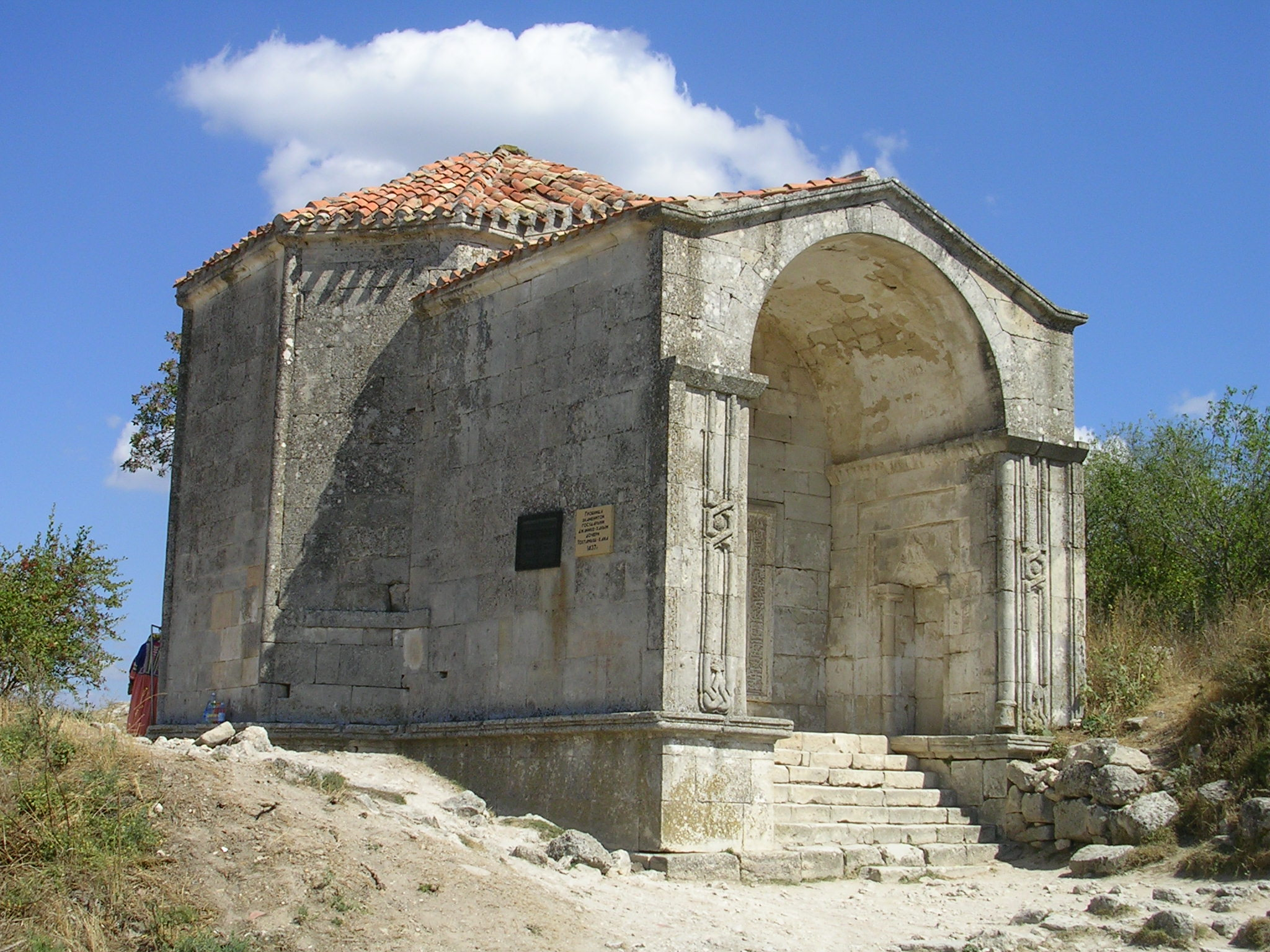 Мавзолей в Чуфут-Кале Автор Vasbur Крым, 2005